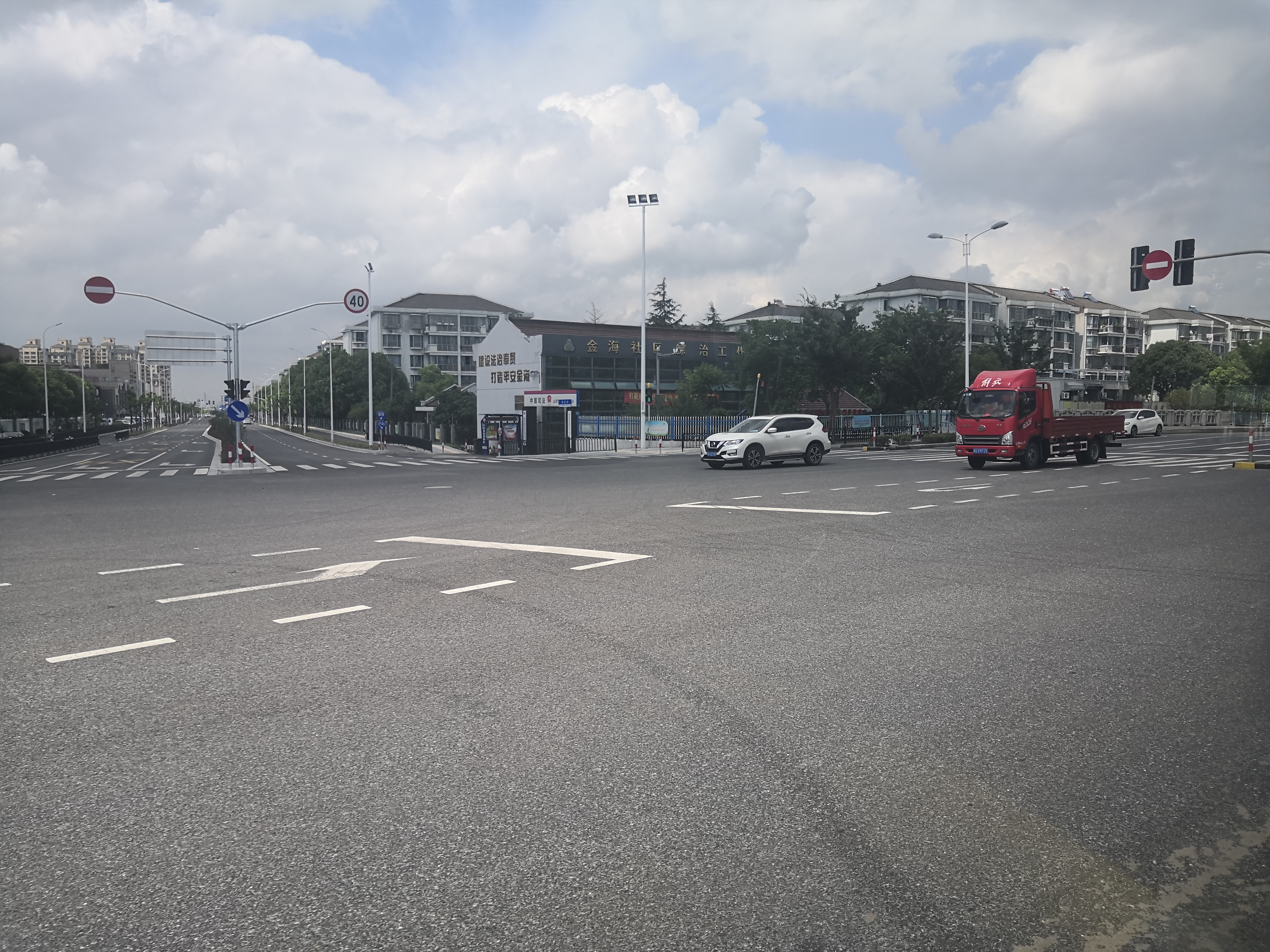 奉贤区金海社区